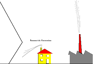 Dessin sommaire